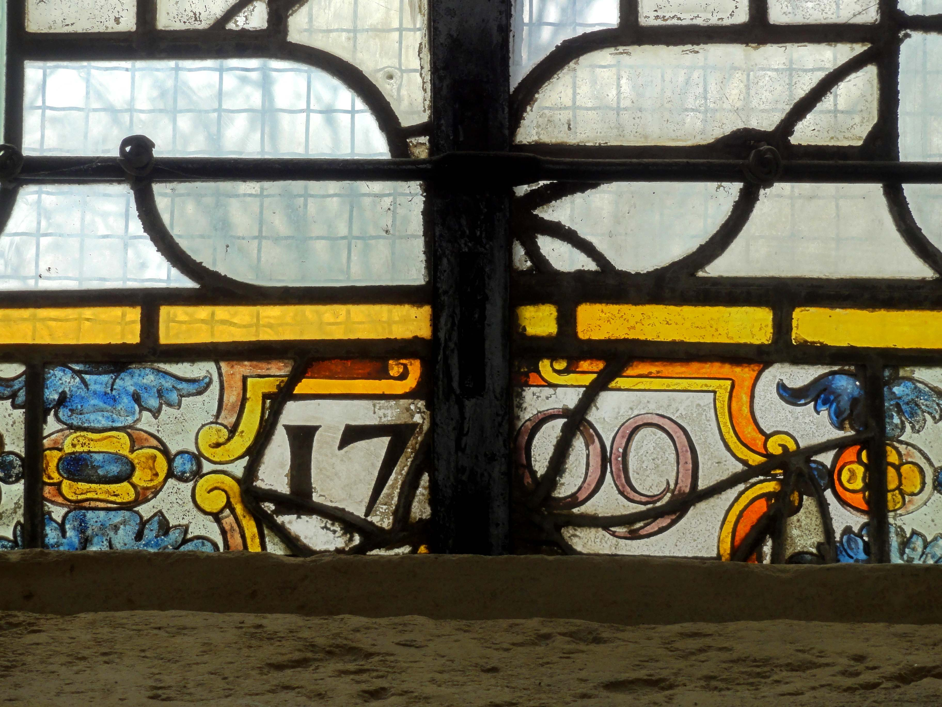 Vitraux de 1709 de l'église Saint-Acceul d'Écouen, dans la nef et la base du clocher.